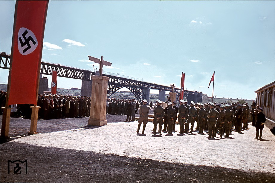 Открытие окупационными войсками отремонтированного моста Стрелецкого в Запорожье, Вид сбоку, 1943 год